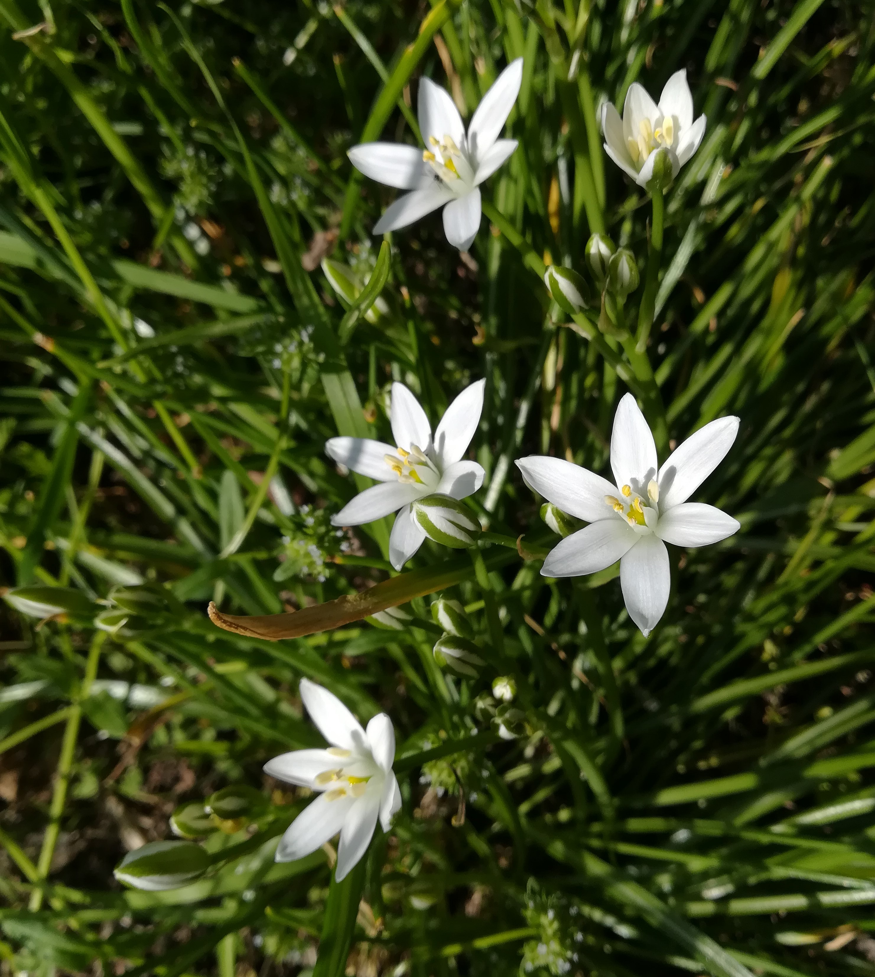 Wielkopolski Park Narodowy: Obszar Ochrony Ścisłej Bagno Dębienko.